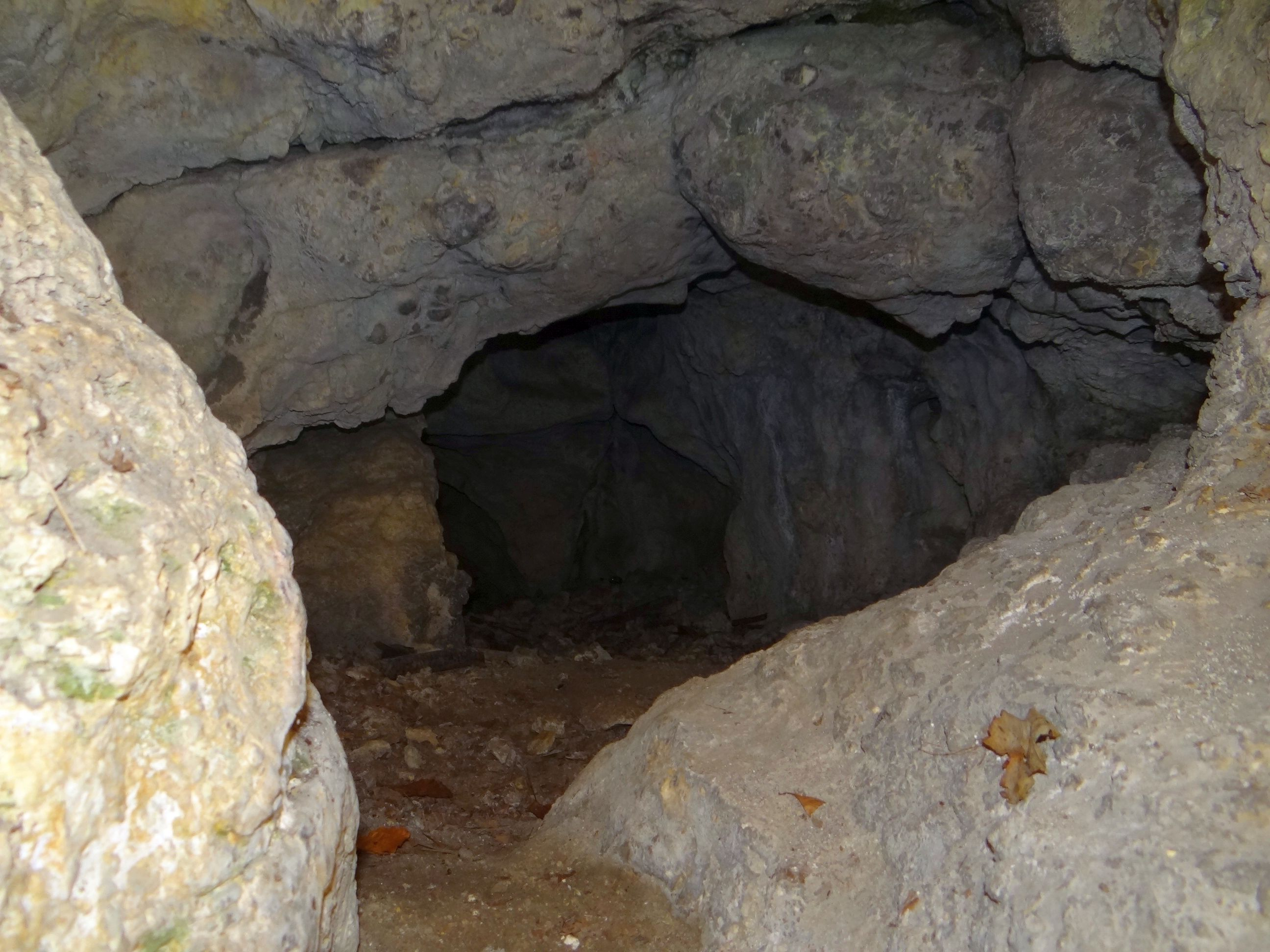 Schronisko Wielki Okap w Cygańskiej Turni w Dolinie Brzoskwinki